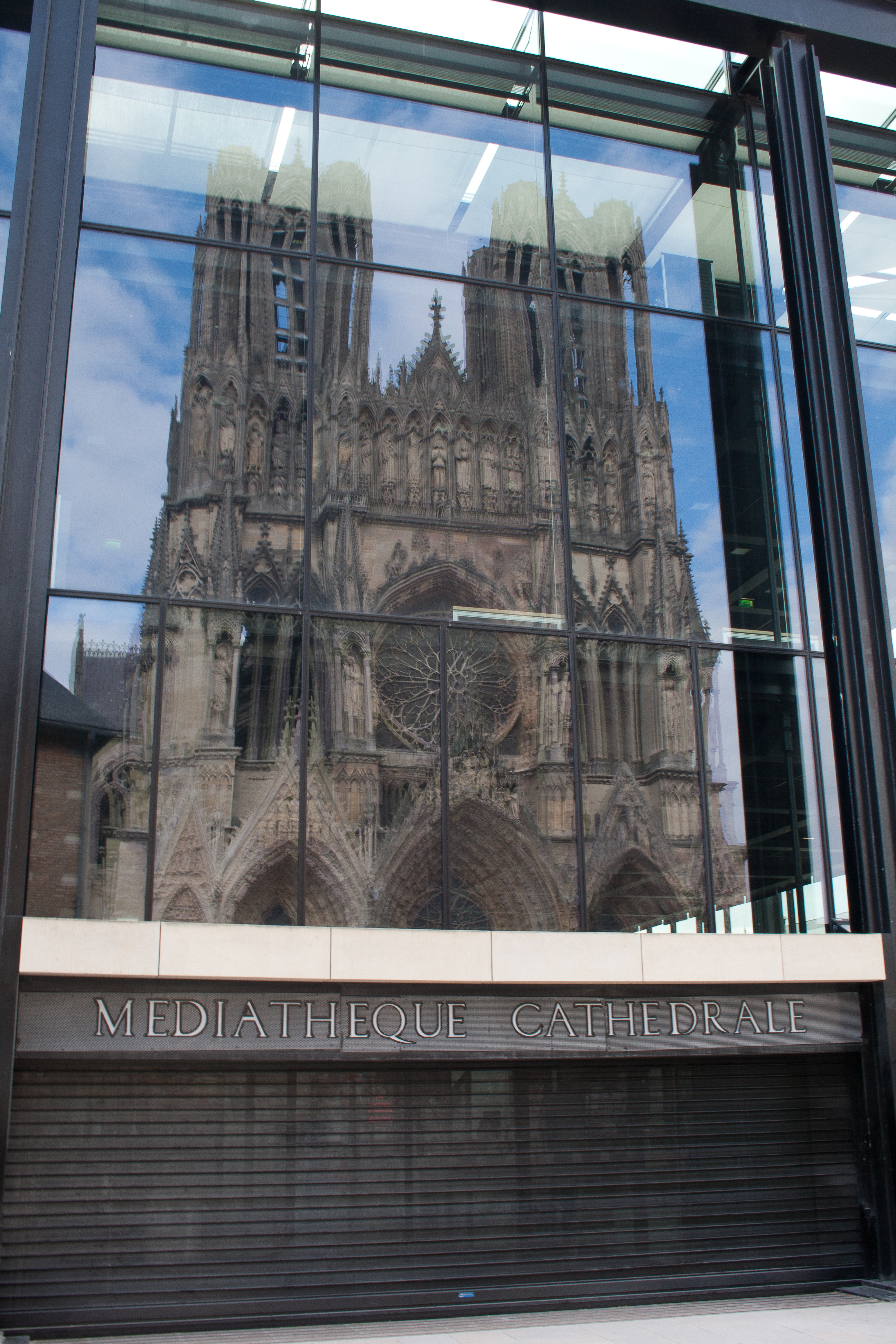 Reflet de la cathédrale de Reims prise sur la façade vitrée de la médiathèque. La cathédrale date du 11ème siècle, la médiathèque des années 2000.